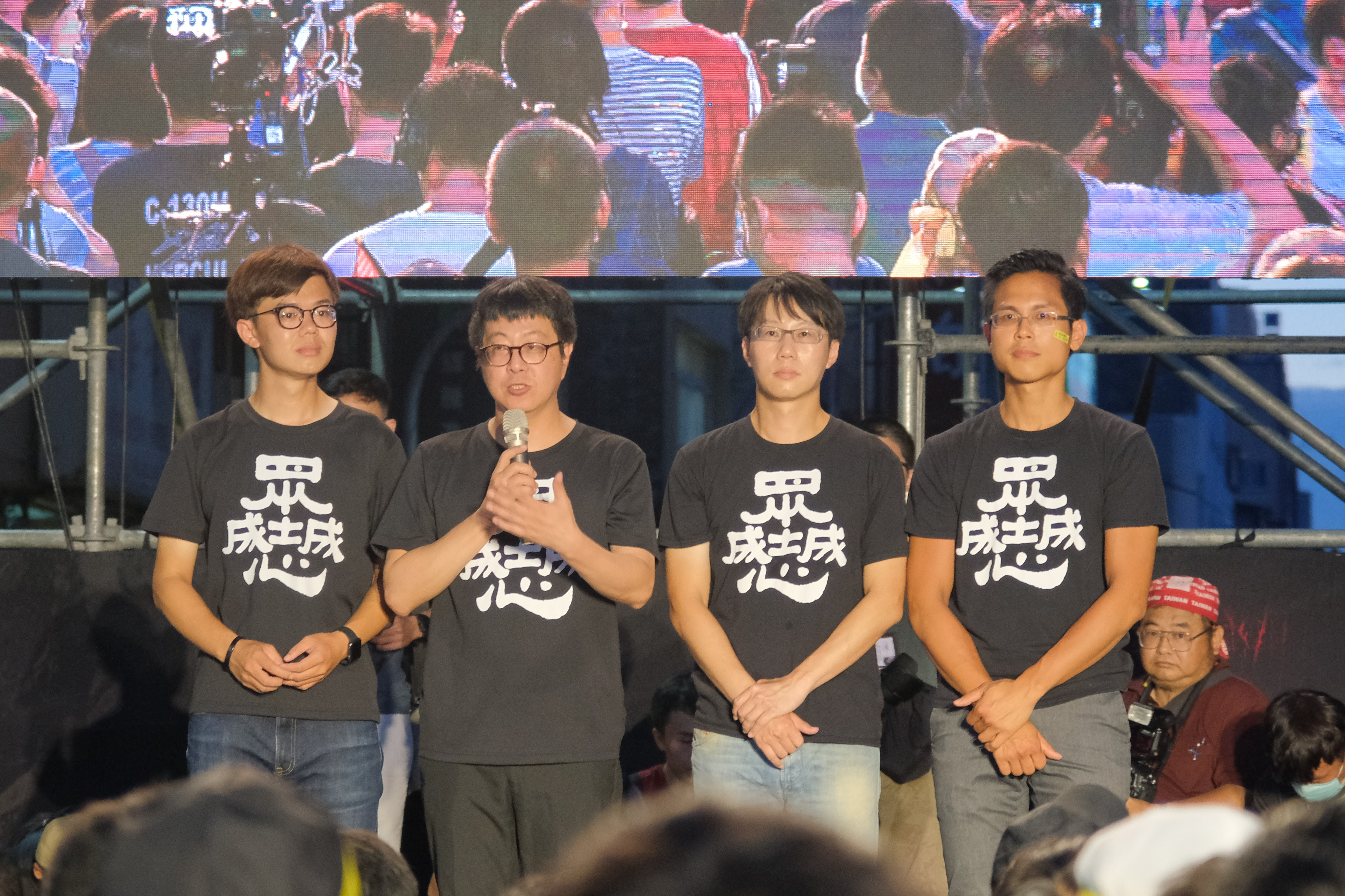 中文（台灣）: zh:2020年高雄市市長韓國瑜罷免案 四名領銜人在選後談話。